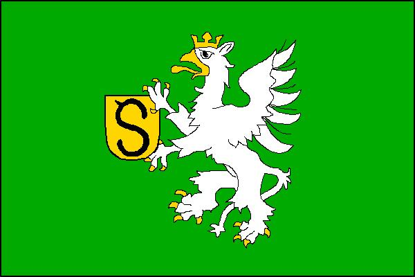 Vlajka obce Stonava